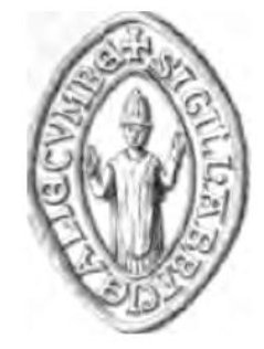 Sceau de l'abbaye d'Hautecombe apposé à une charte de 1220